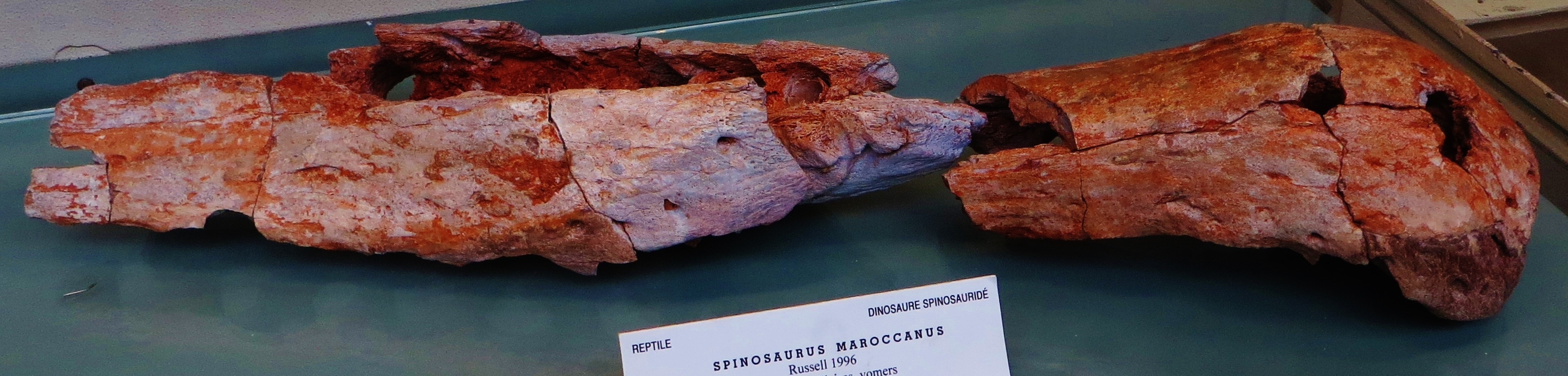 Fossil of Spinosaurus, an extinct reptile- Took the photo at Musee d'Histoire Naturelle, Paris